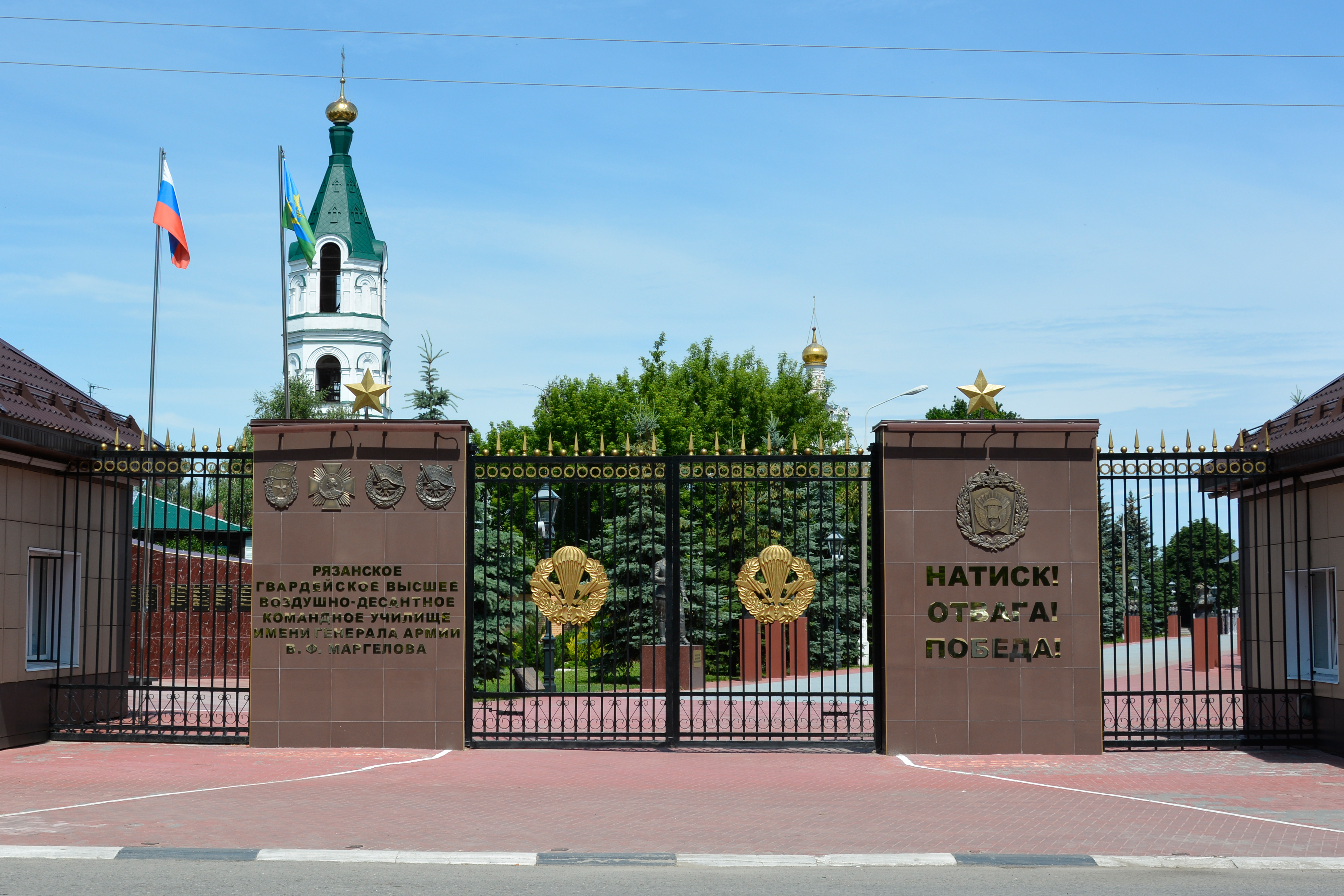 Ворота Рязанского гвардейского высшего воздушно-десантного ордена Суворова дважды Краснознамённого командного училища имени генерала армии В. Ф. Маргелова. 25 июня 2020 г.